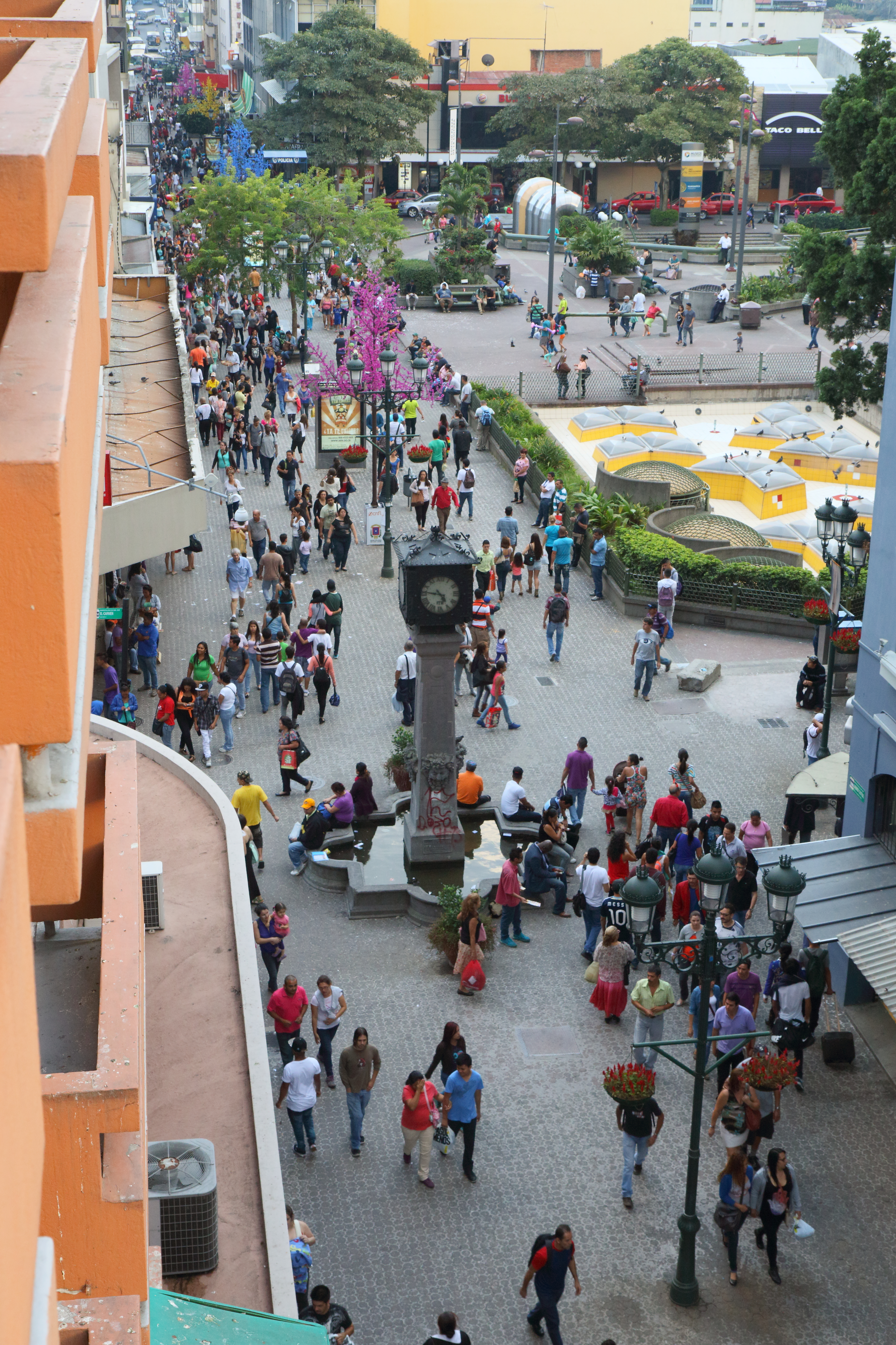 Avenue centrale, San José, Costa Rica.